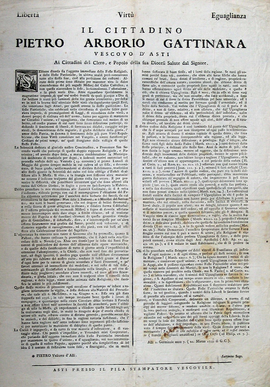 Documento di Pietro Arborio Gattinara Vescovo di Asti. Documento del XVIII secolo fotografato da me Faberh